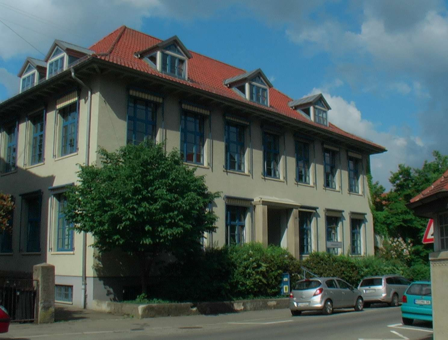 Arbeitsgericht Reutlingen in der Bismarckstraße 64